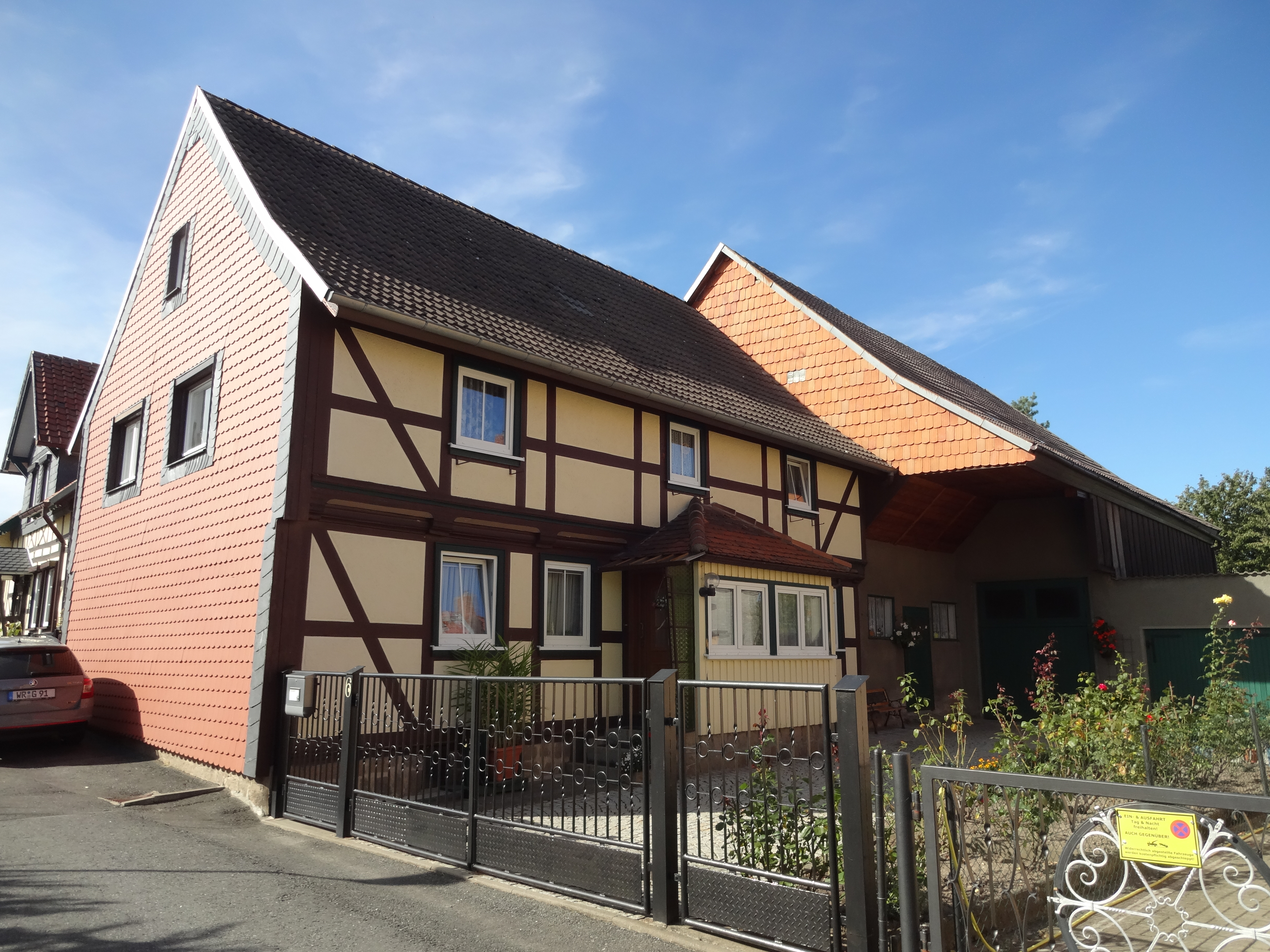 denkmalgeschütztes Bauernhaus in der Schmiedestraße 6 in Drübeck